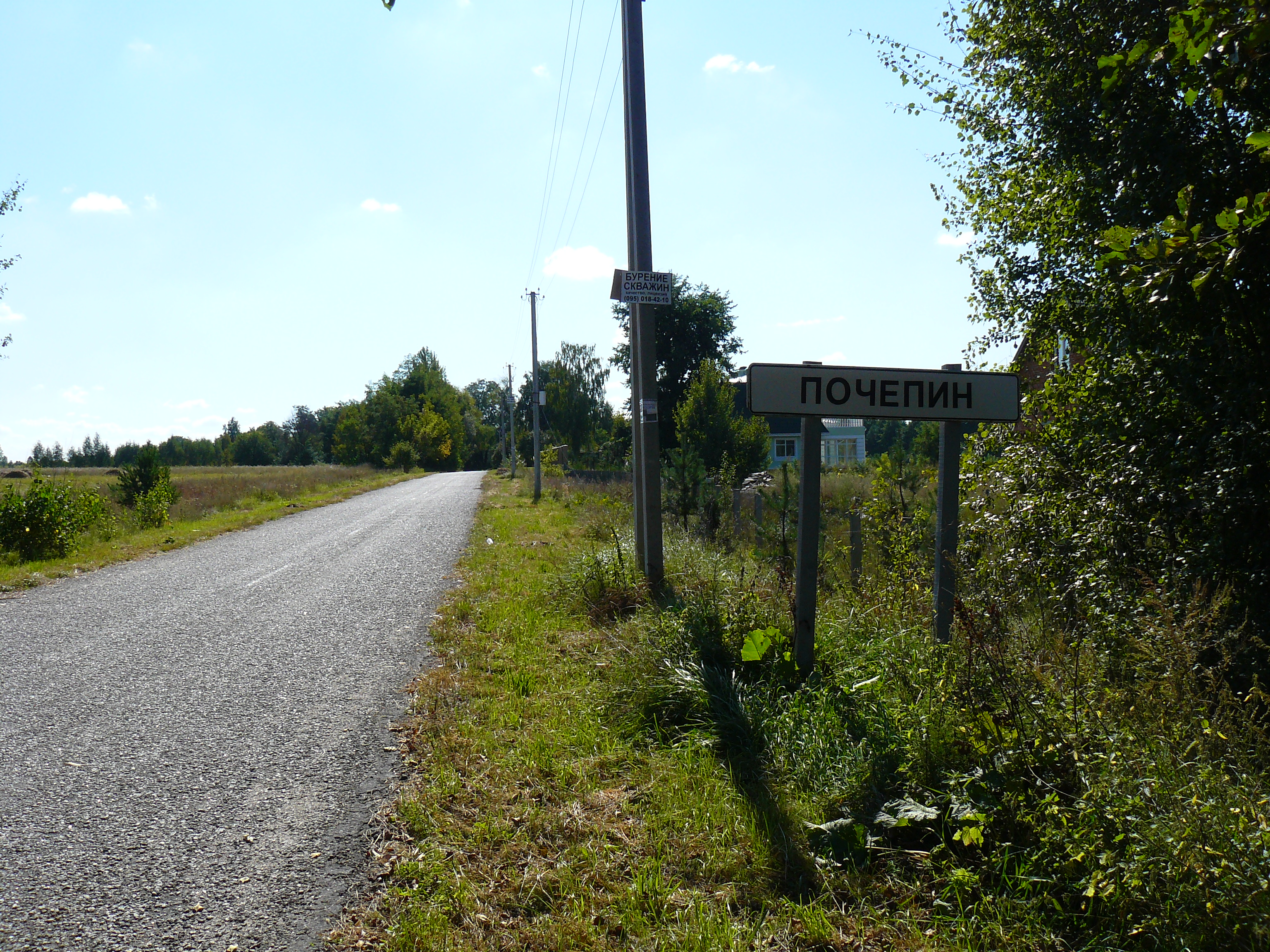 Хутір Почепин